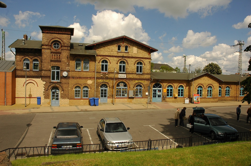 Bahnhof Bergen auf Rügen